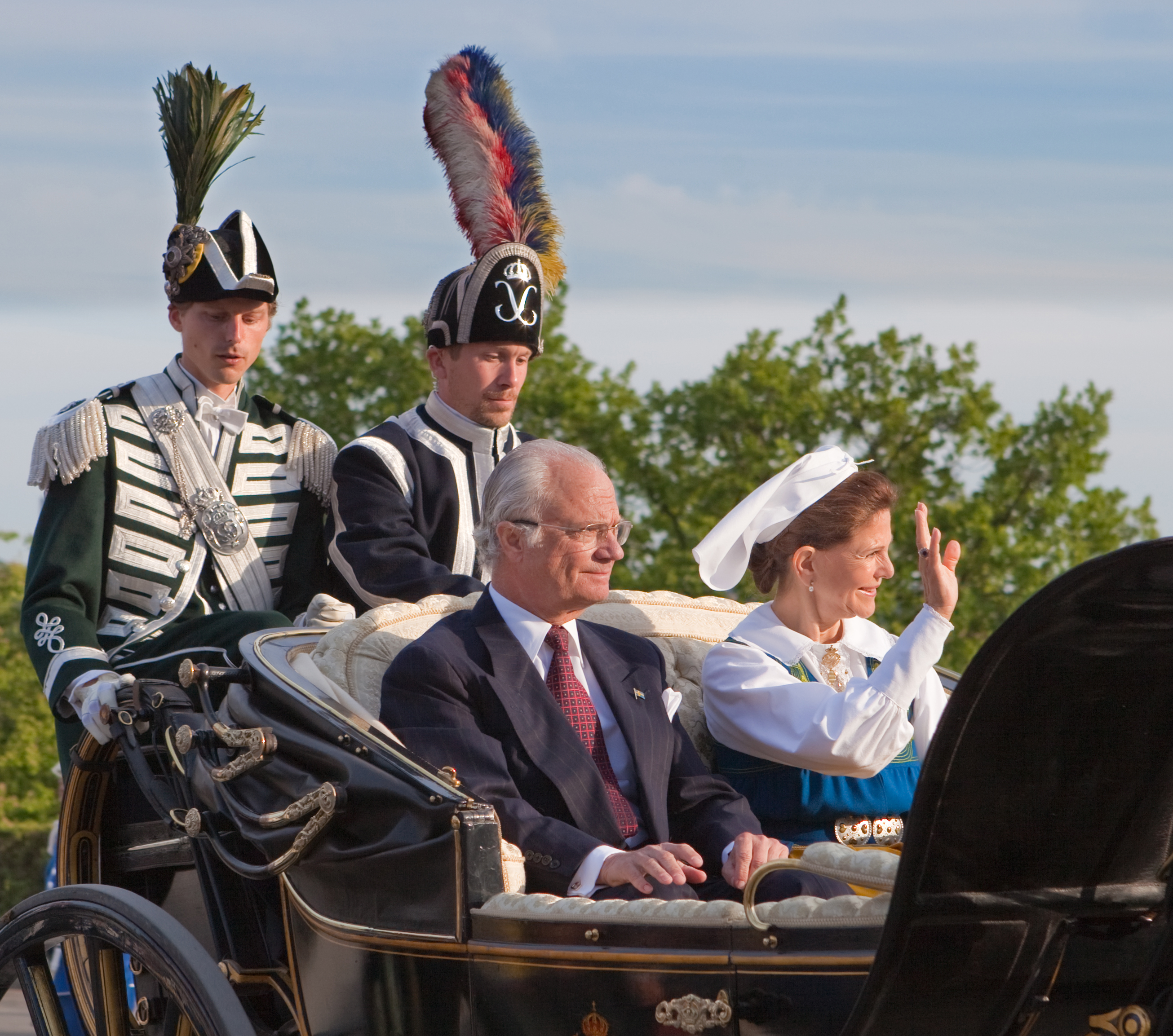 King Carl XVI Gustaf of Sweden and Queen Silvia at Skansen, Stockholm 2010